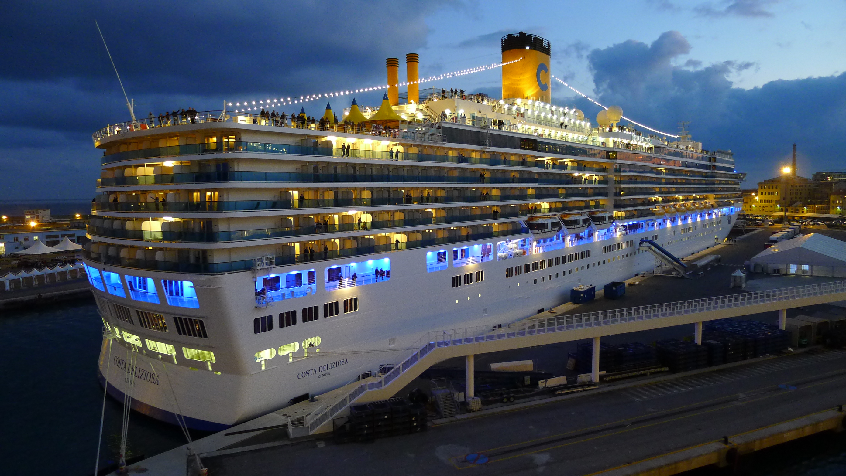 M/S Costa Deliziosa Savona Italien